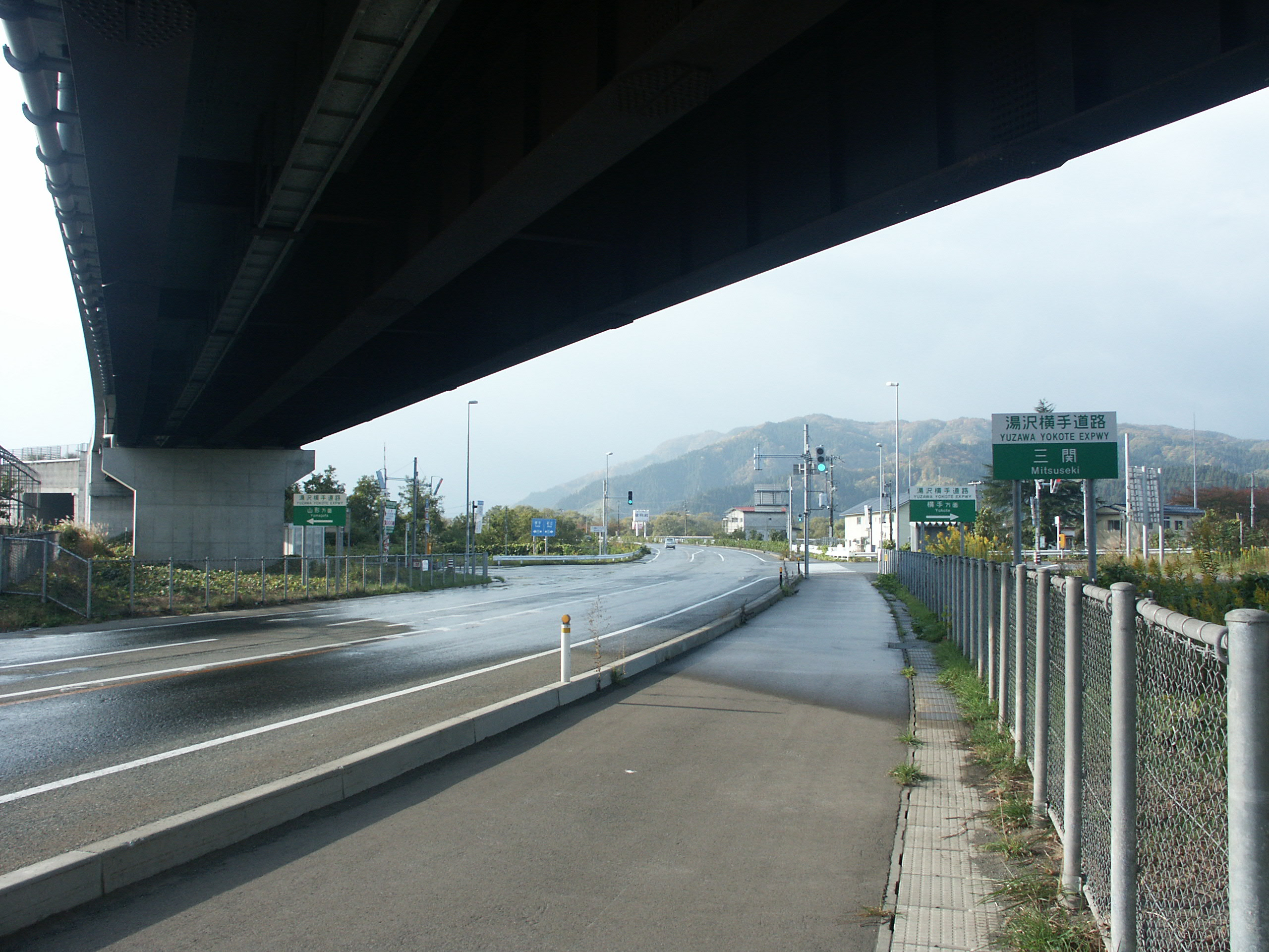 湯沢横手道路三関IC（国道13号線との交差点付近）